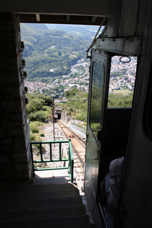 funiculaire du Pic du Jer (Jer's peek funicular), Lourdes